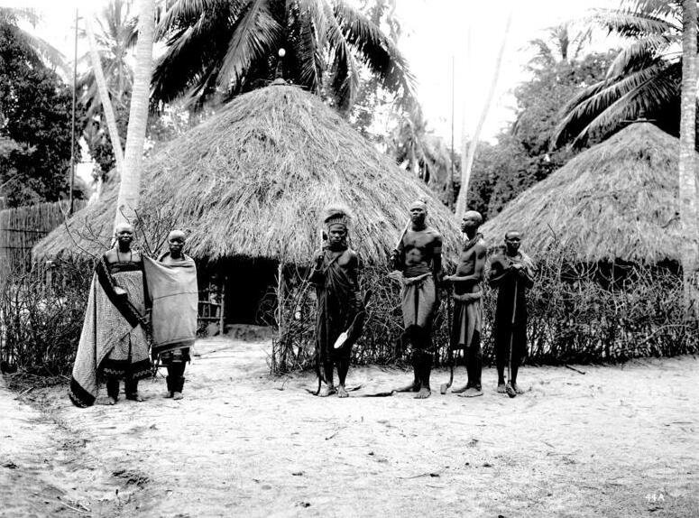 Wassukuma aus der Gegend von Kondoa Irangi, Gruppe aus Ausstellung